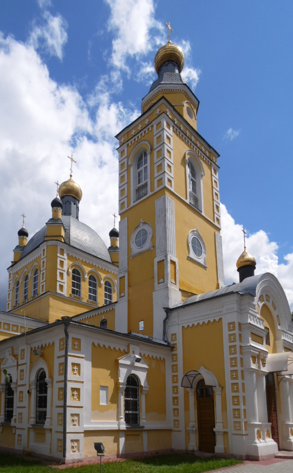 Церковь Петра и Павла (Брянская область, Клинцы, Октябрьская улица, 7)